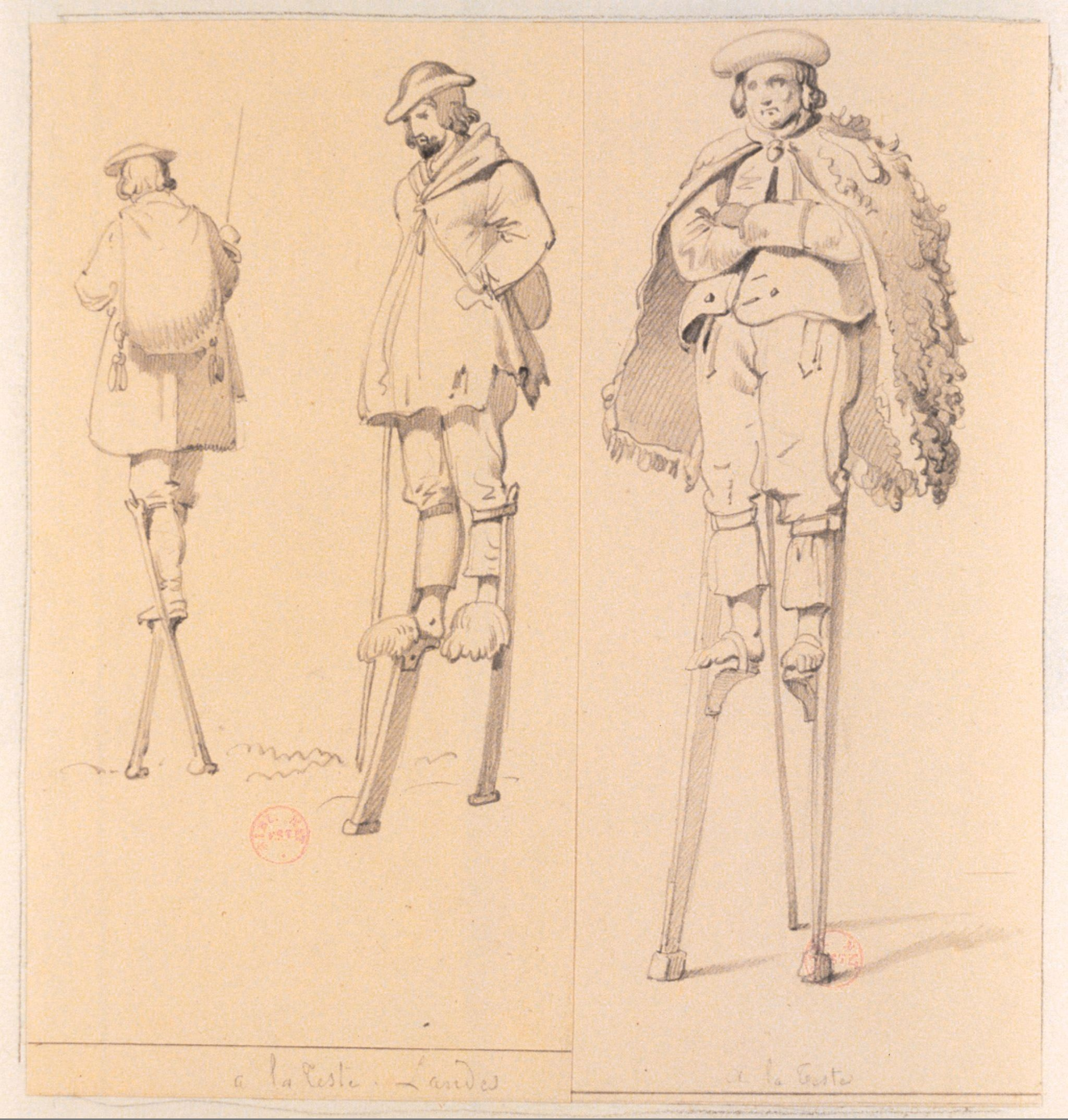 A la Teste. Landes. Bergers des Landes montés sur des échasses, 3 dessins à la mine de plomb et lavis à l'encre de Chine sur papier beige